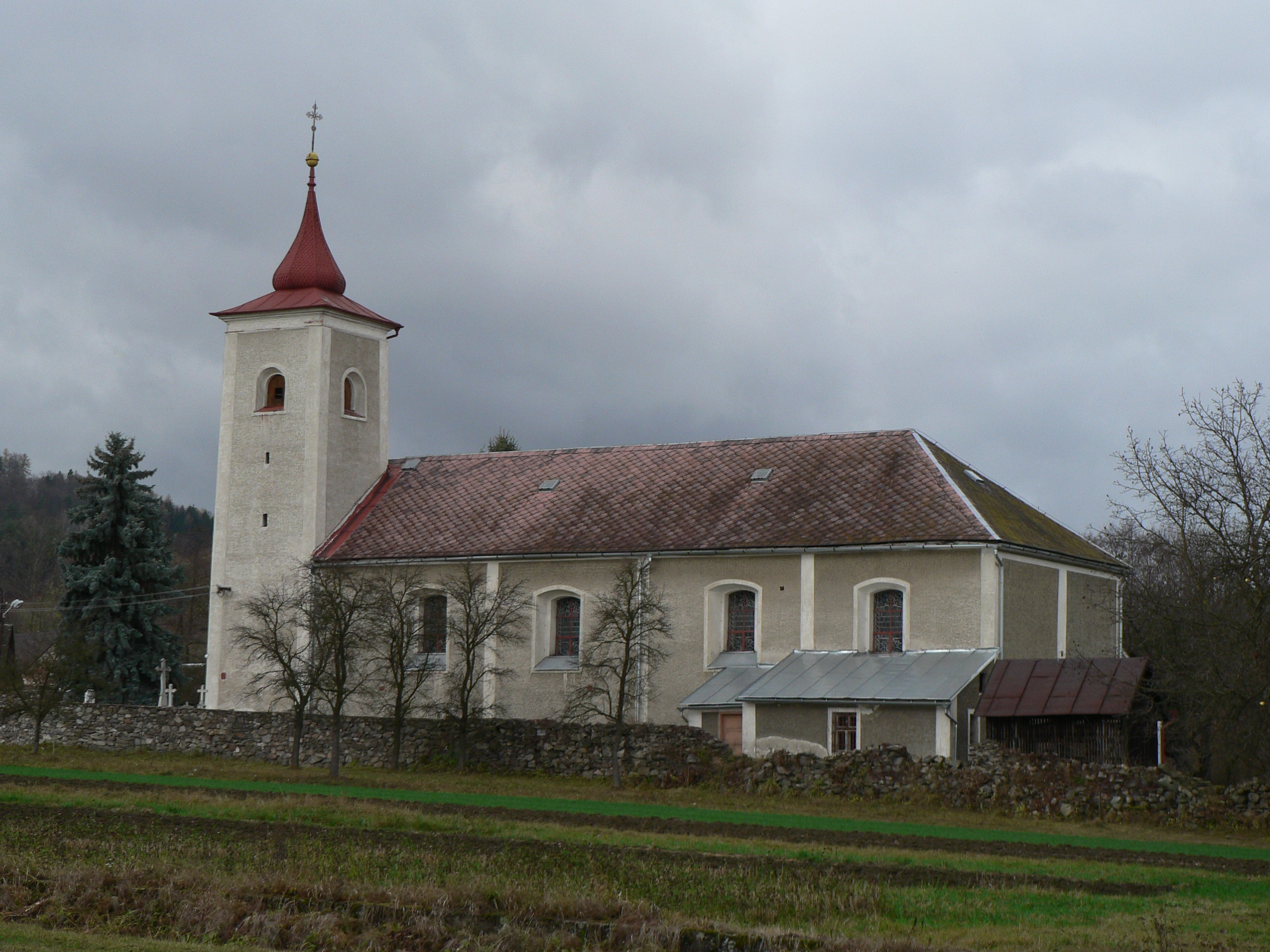 Kostel Zvěstování Panny Marie (Klášterec)